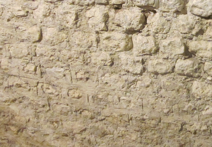 Détail des maçonneries de la cella du temple